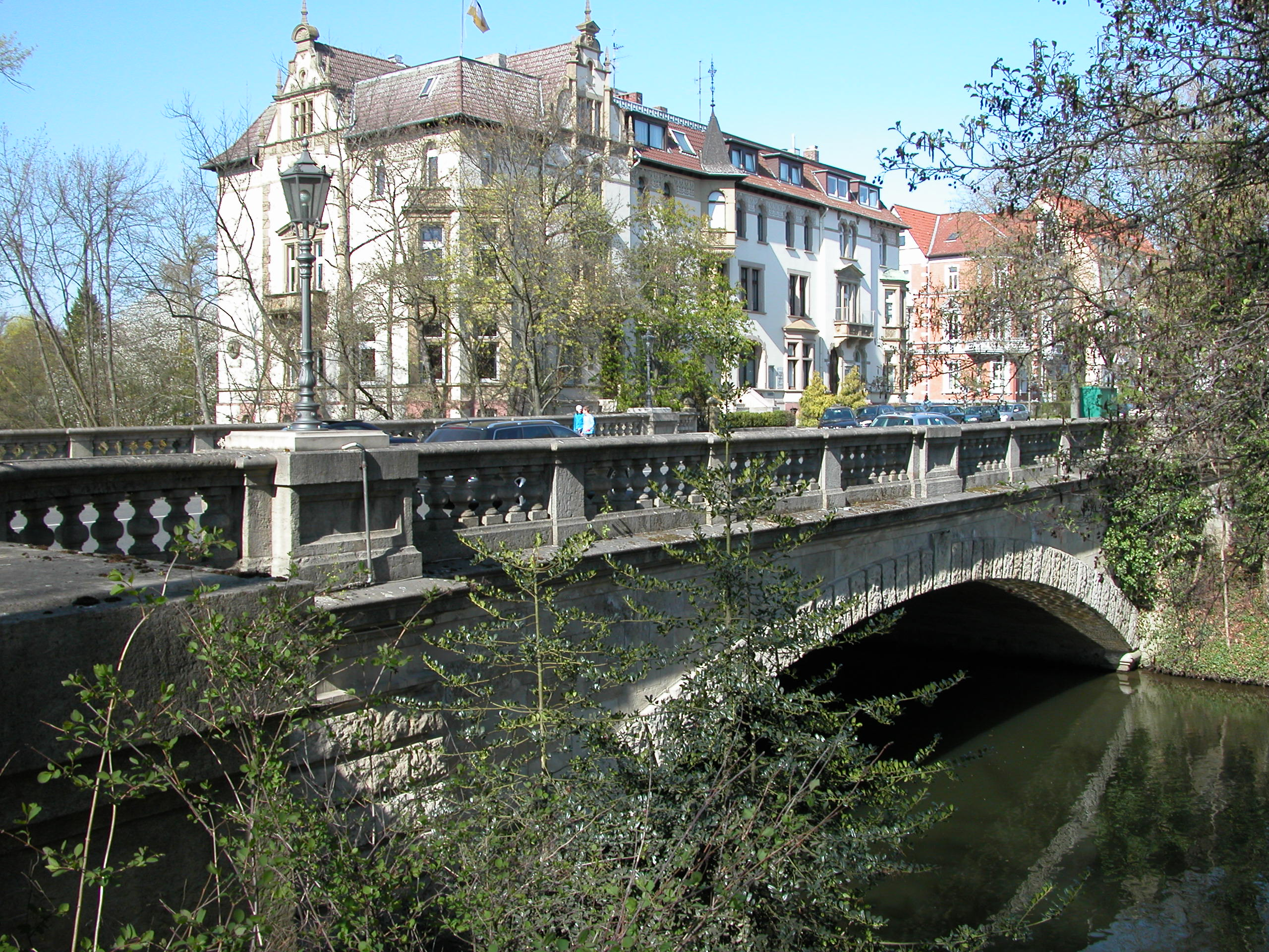 Braunschweig, Jasperallee: Theaterbrücke (ursprünglich Kaiser-Wilhelm-Brücke), von Süden gesehen